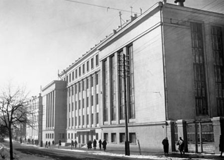 Беларуская (тарашкевіца): Вуліца К.Маркса. Від на Вышэйшую партыйную школу